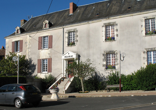 Mairie de Cusay, France, Indre-et-Loire